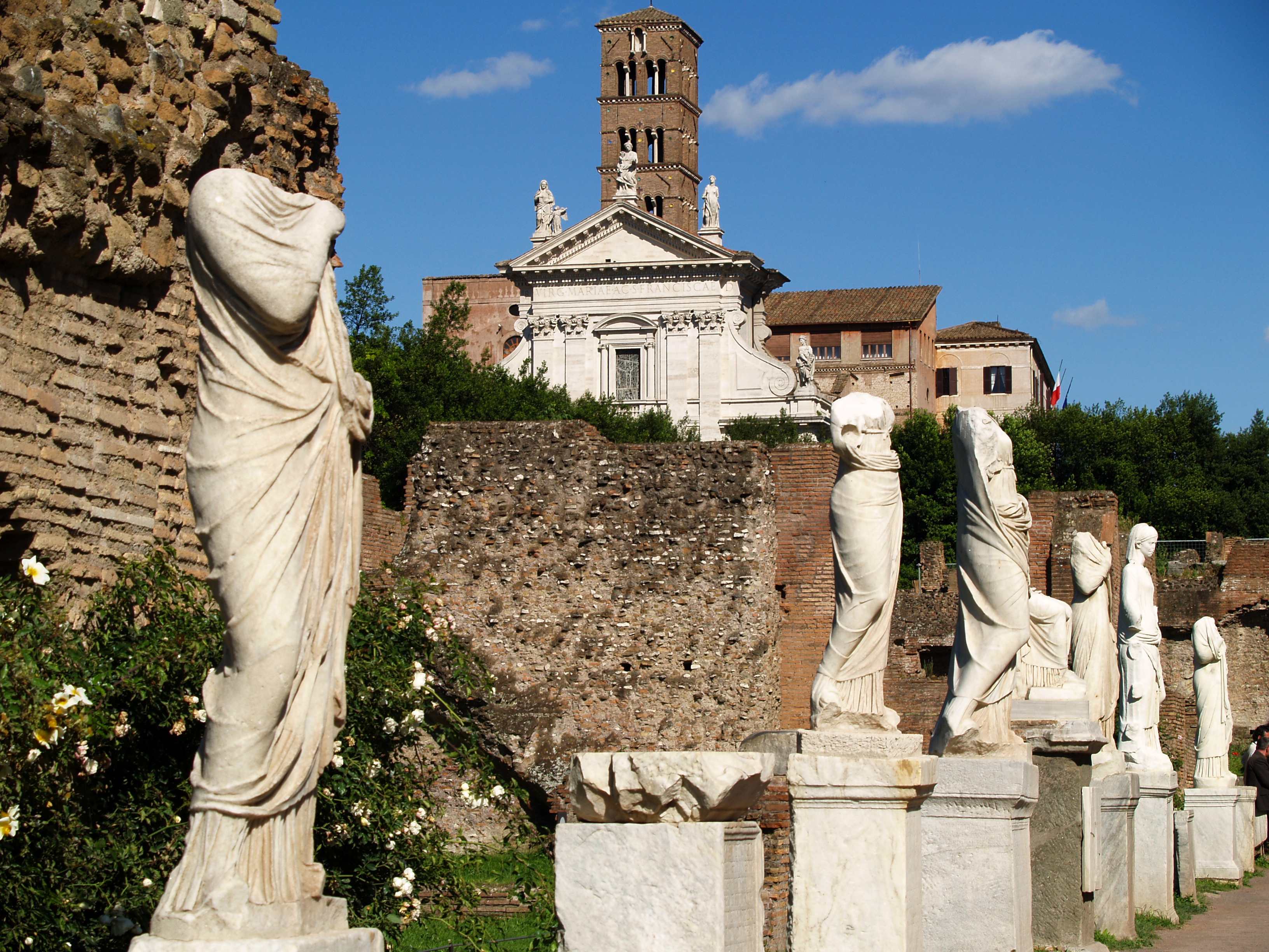 Casa de las Vestales, estatuas.